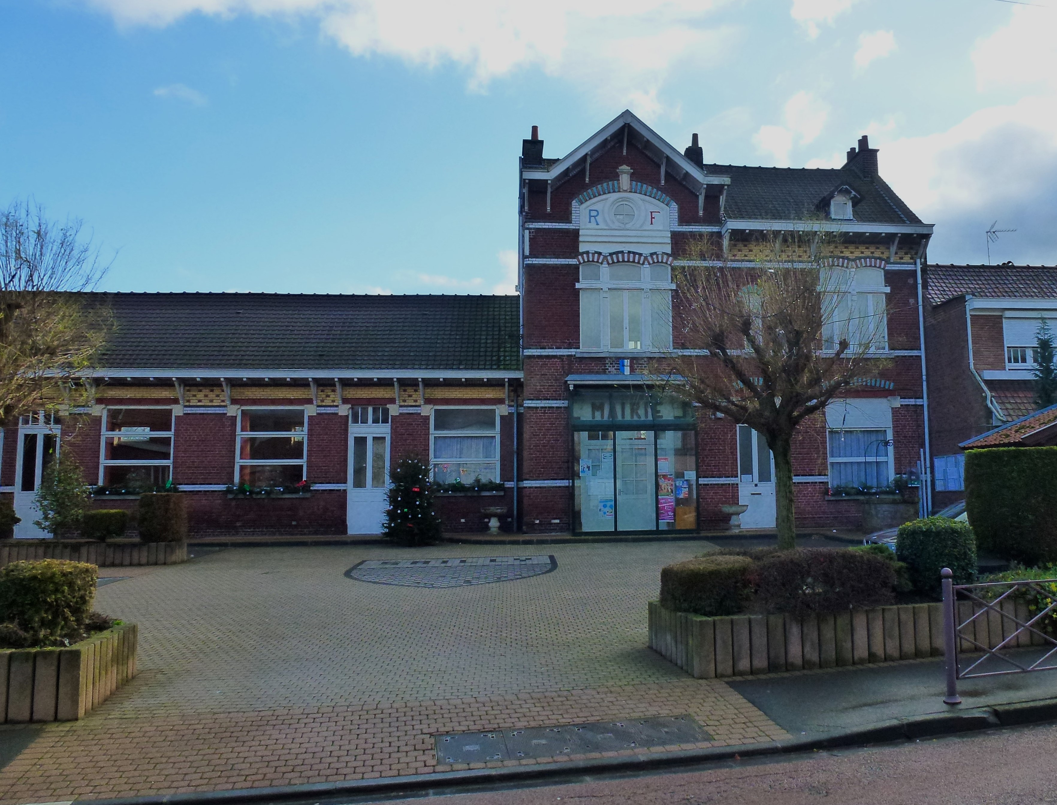 la mairie Sailly-lez-Lannoy dans le Nord Nord-Pas-de-Calais.- France.